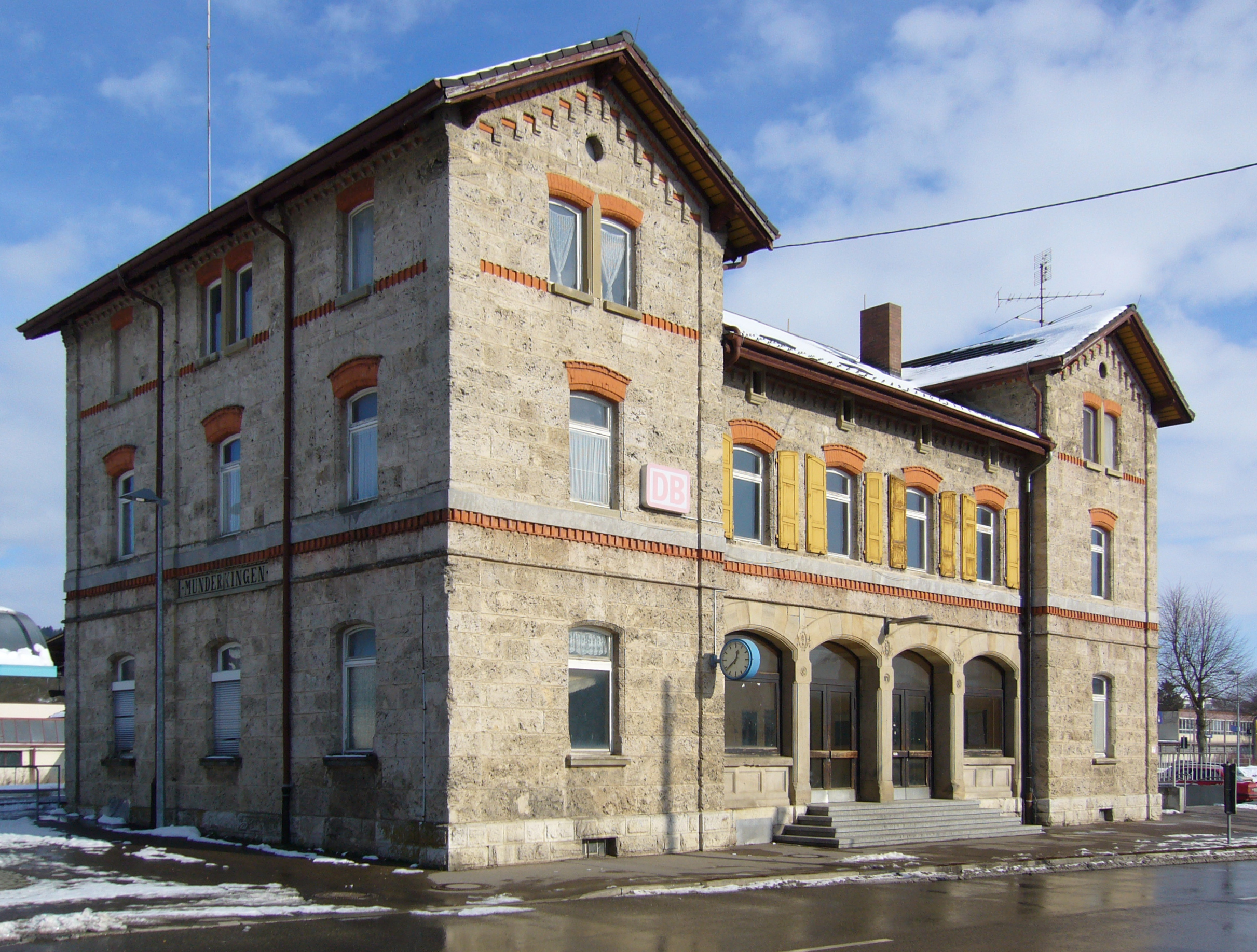 Bahnhofsgebäude in Munderkingen an der Donautalbahn, 1870 erbaut, königlich-württembergisch